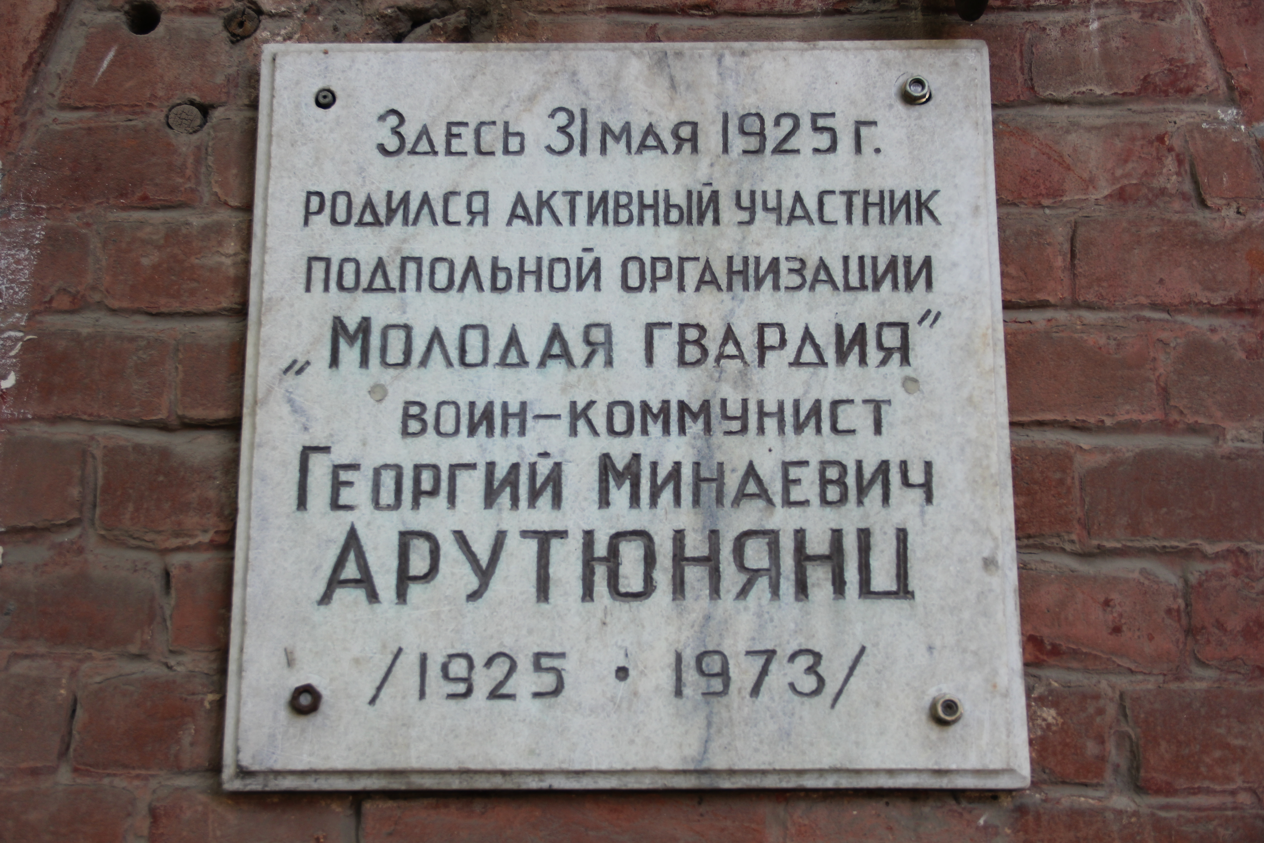 Мемориальная доска на доме, где 31 мая 1925 года родился молодогвардеец Жора Арутюнянц.